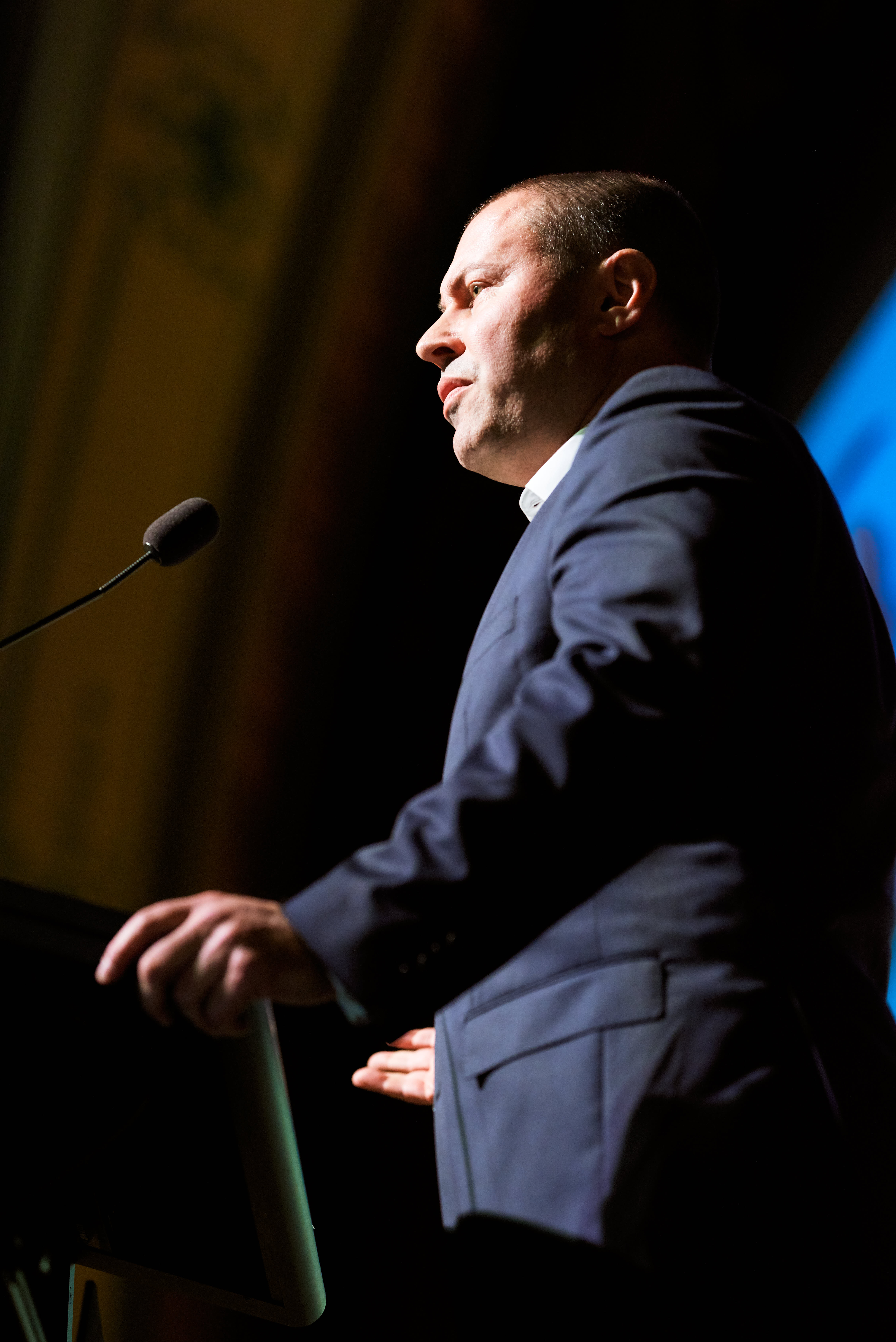 Josh Frydenberg